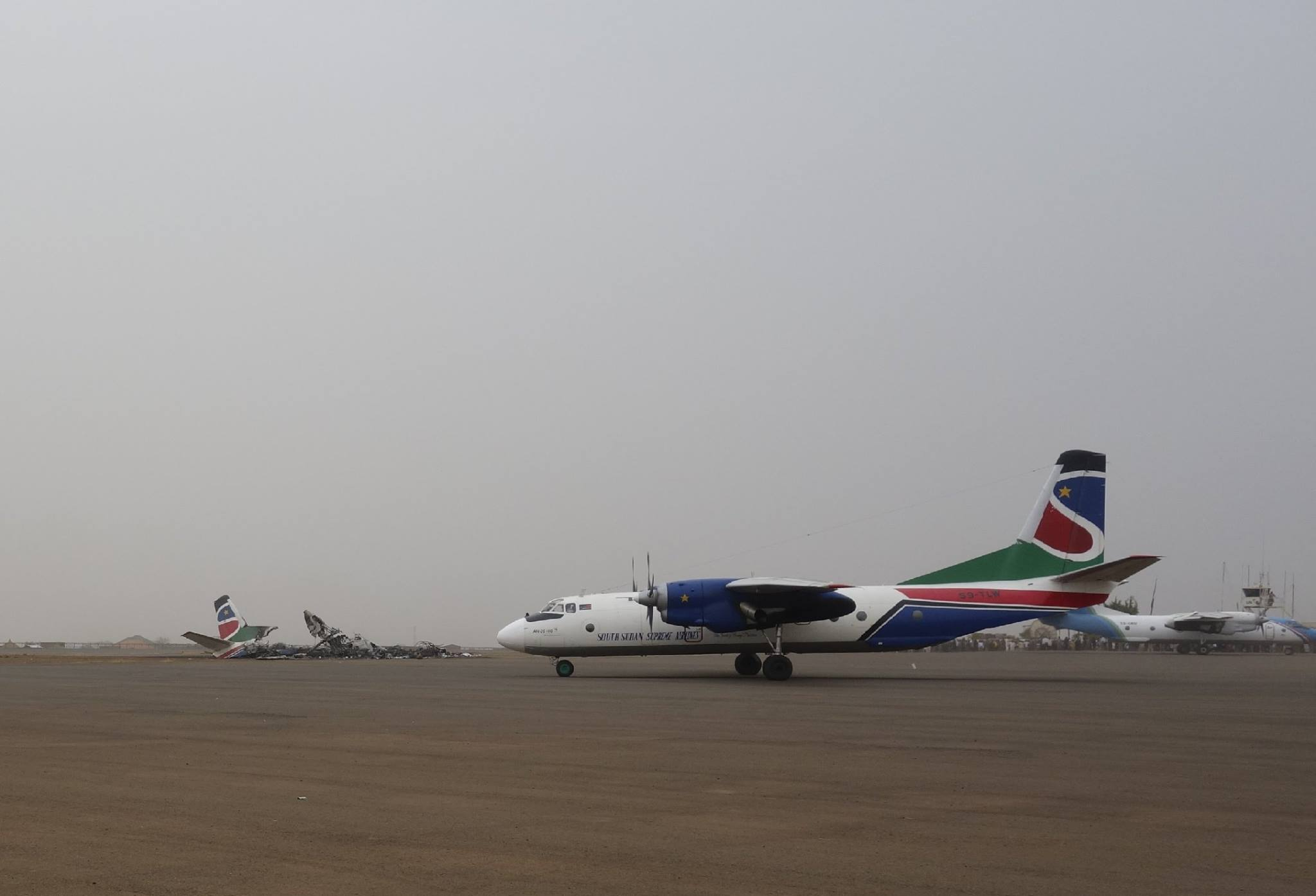 Antonov AN-26 der Southern Supreme Airlines auf dem Flughafen Wau, Südsudan. Im Hintergrund das Wrack der am 20. März 2017 verunglückten AN-26 der gleichen Fluggesellschaft